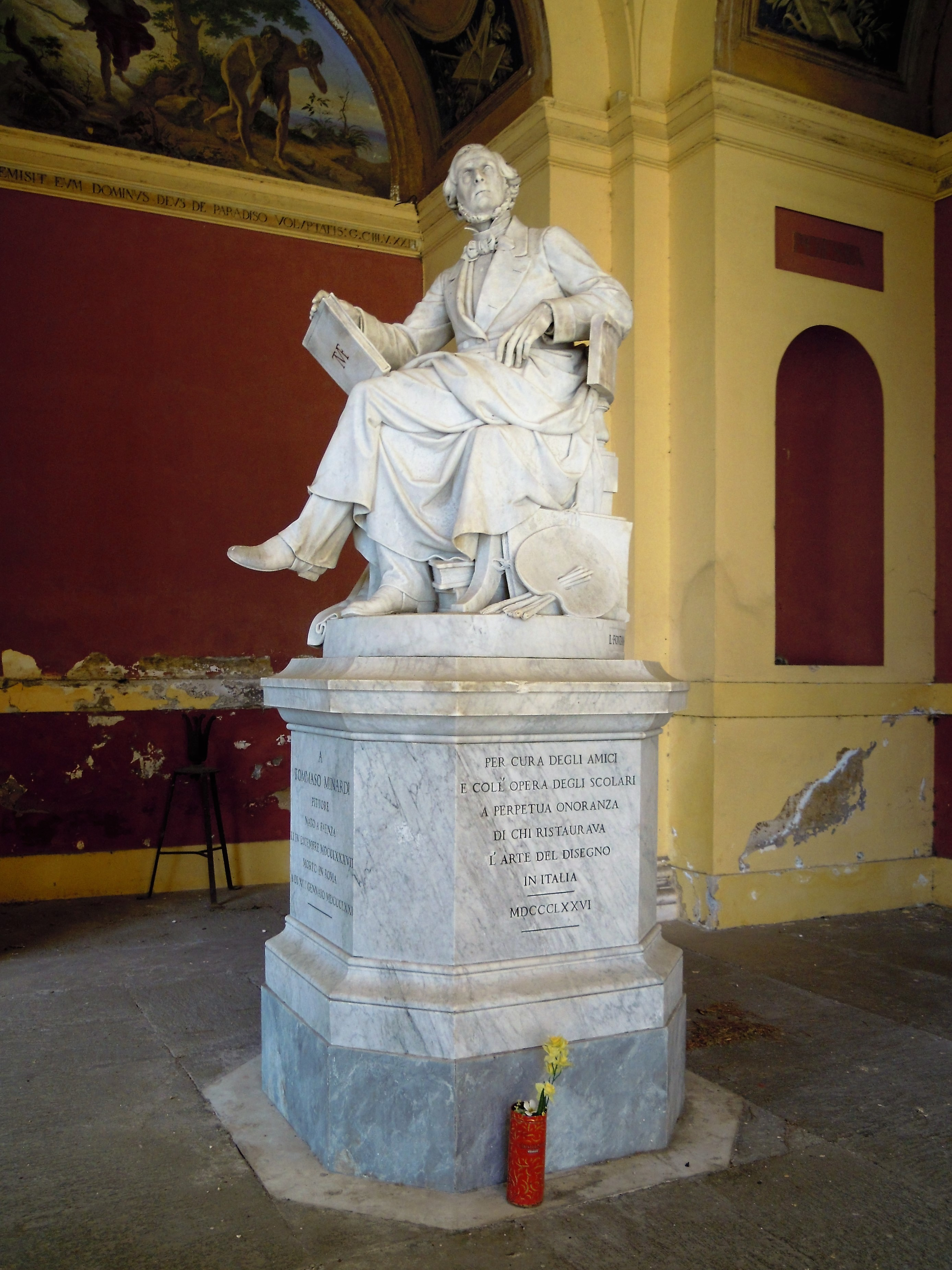 Roma, cimitero del Verano: monumento al pittore Tommaso Minardi (1787-1871)